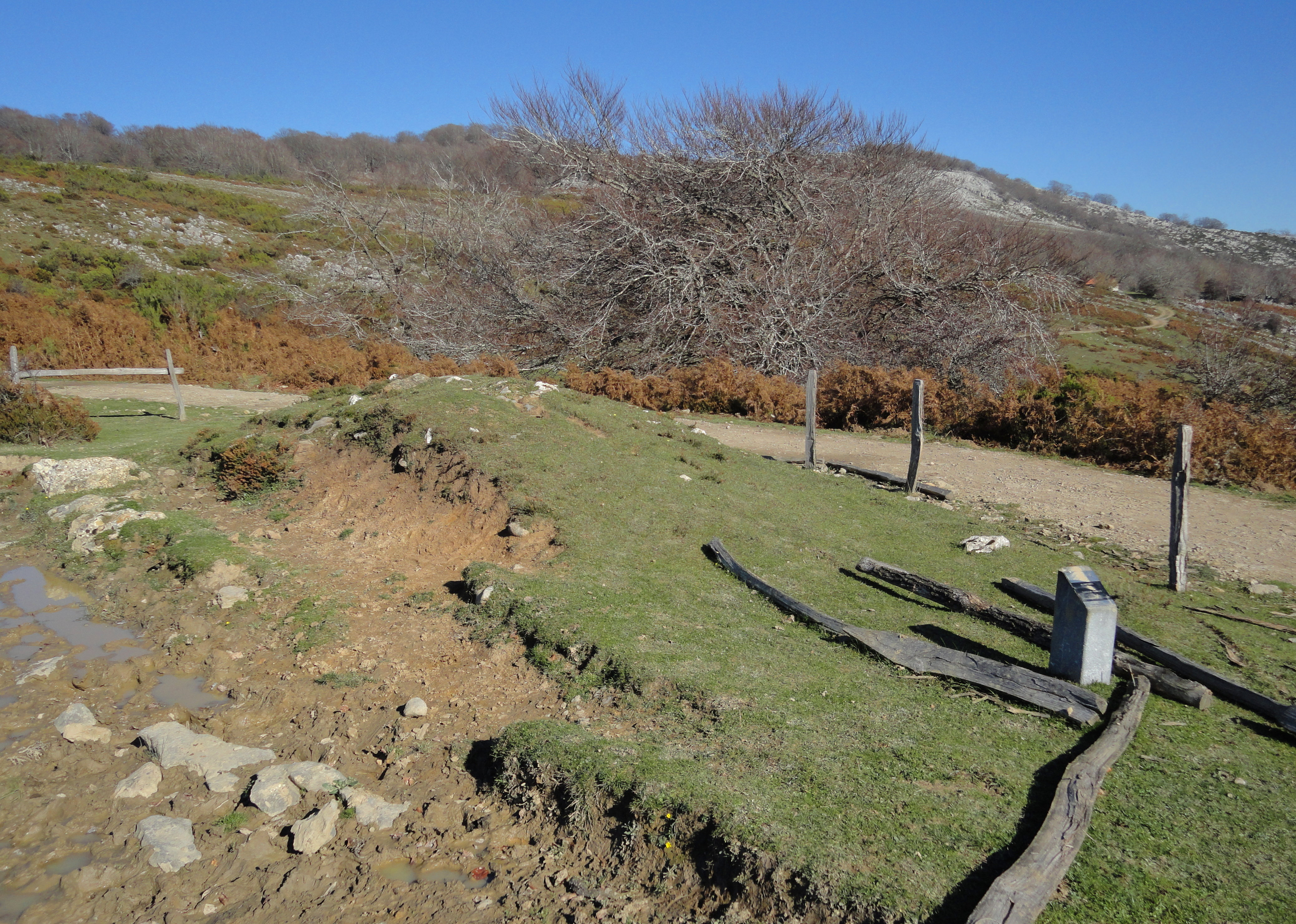 Alabitarte tumulua